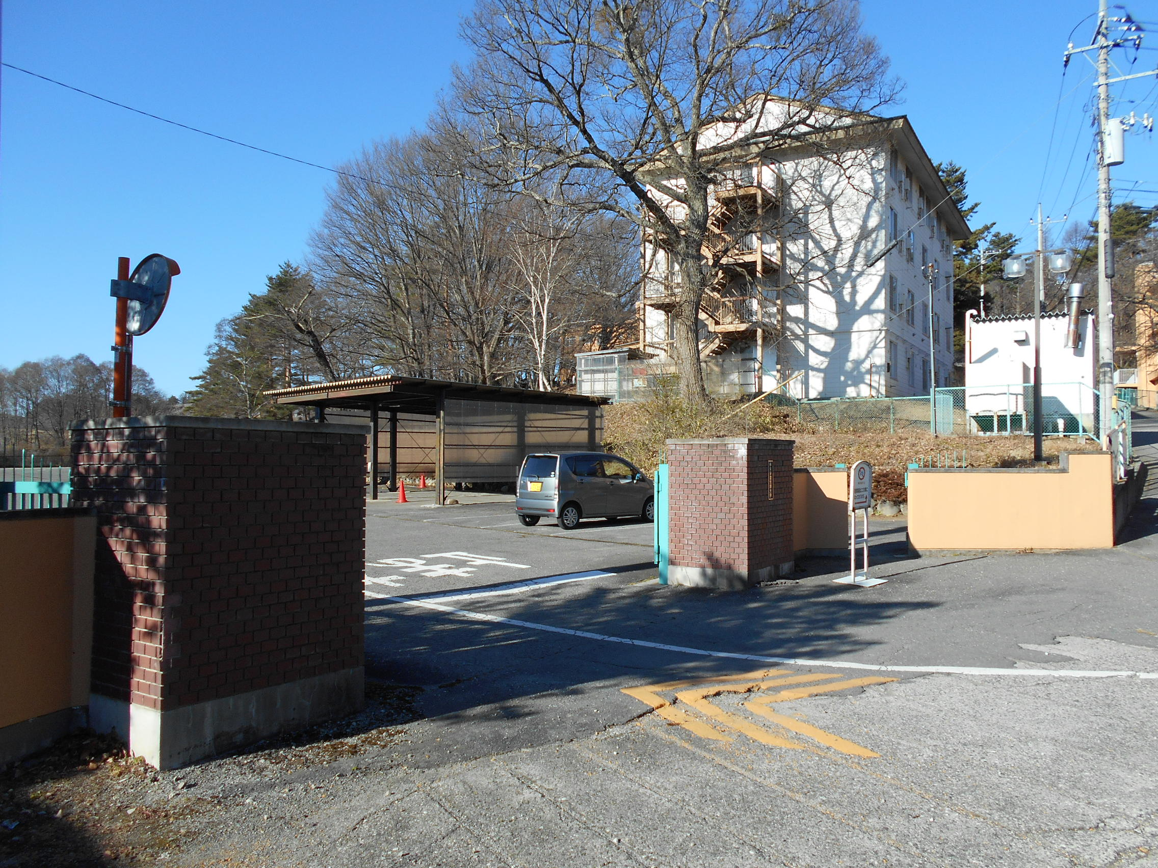 帝京学園短期大学